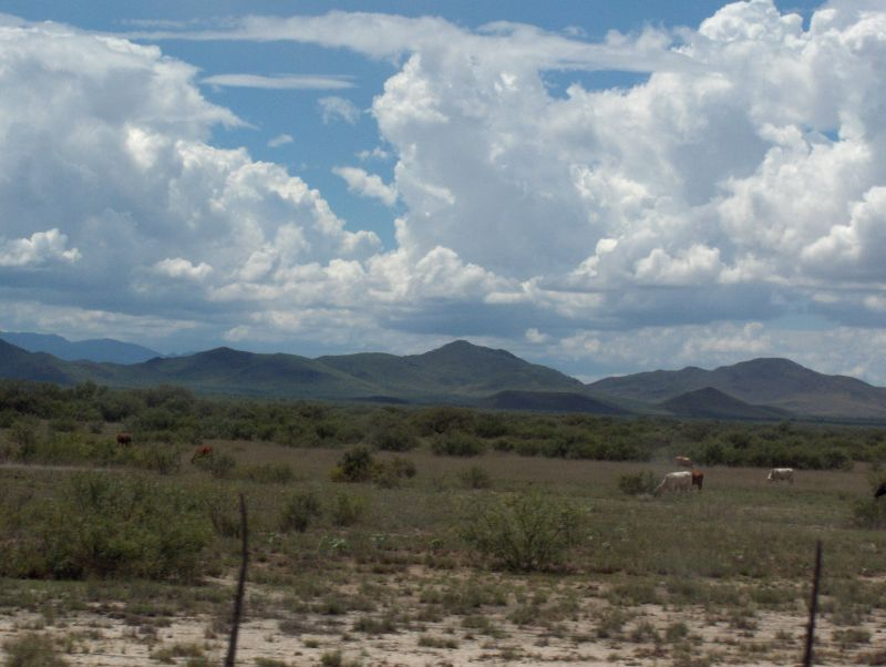 El Terruño...Chihuahua, El Estado Grande Chihuahua, Mexico